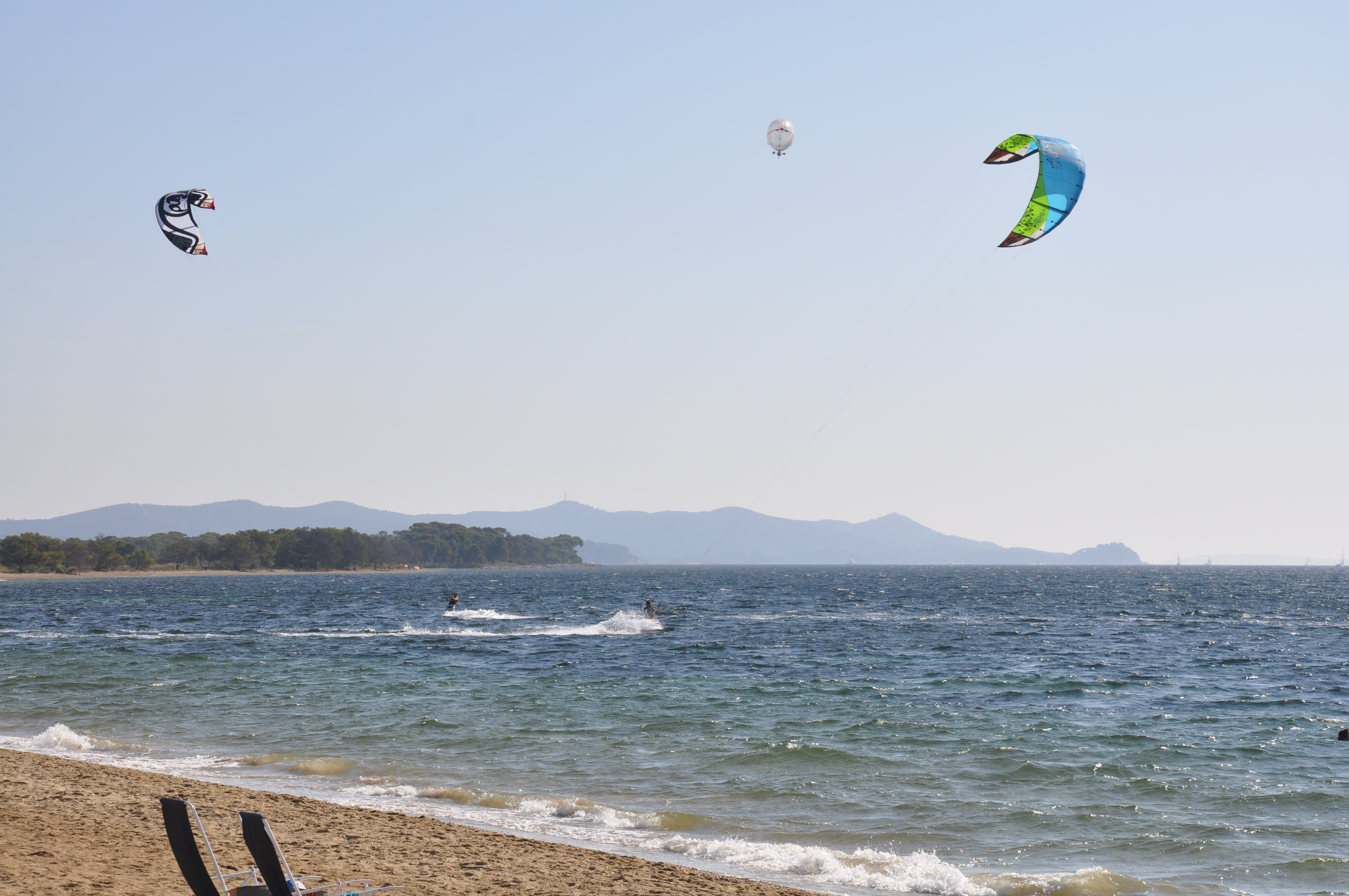 Dirigeable A-NSE dans 25kts de vents à Hyères-Toulon